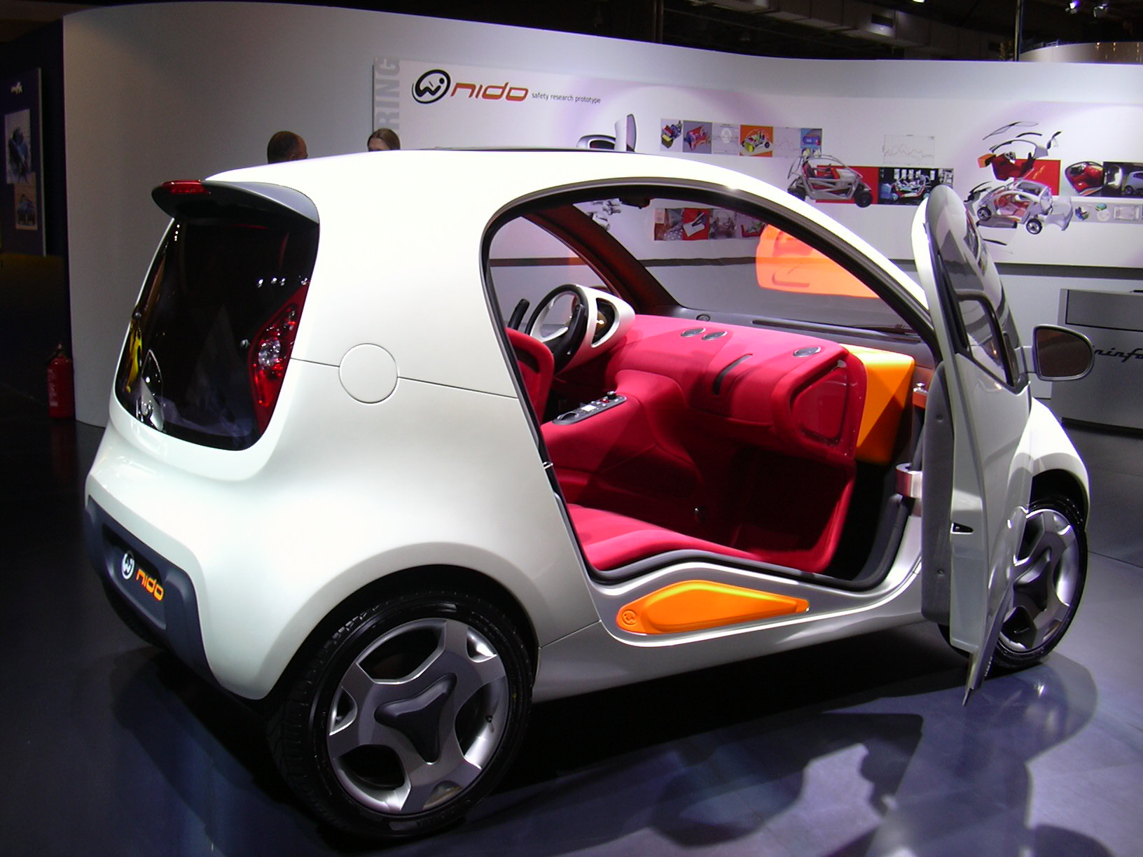 Concept-car Pininfarina Nido au Mondial de l'automobile, Paris, automne 2004. Pour célébrer ses 80 ans, le carrossier turinois revisite au printemps 2010 sa citadine, en développant Nido EV, variante électrique.